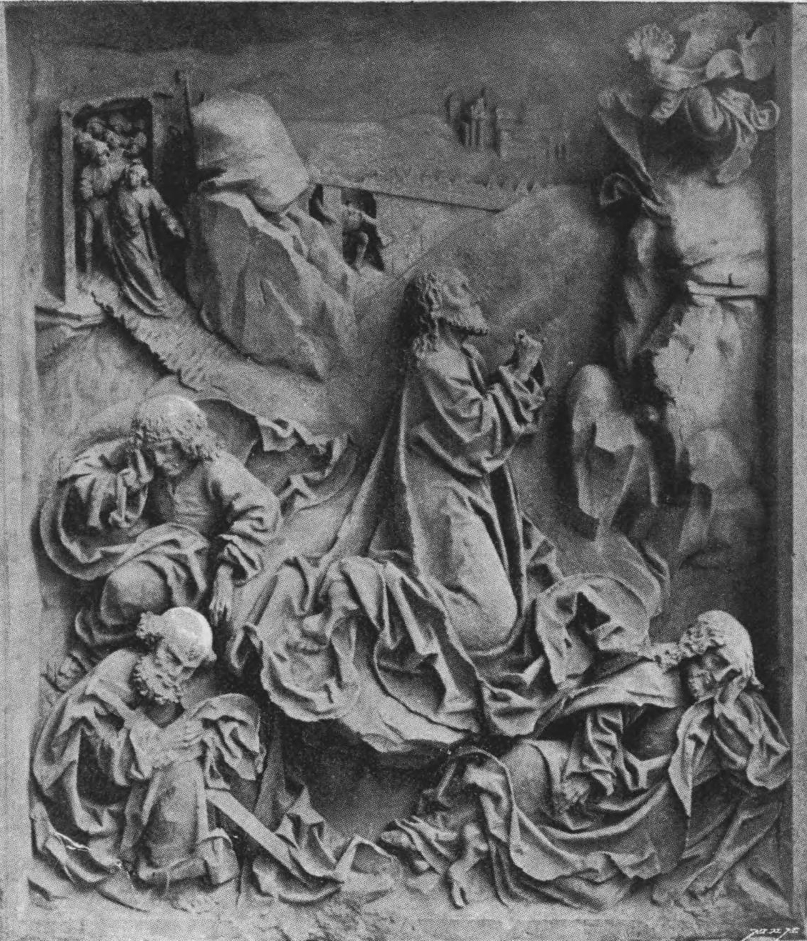 Chrystus w Ogrodzie Oliwnym, ok. 1480-85. Wit Stwosz. Obecnie Muzeum Narodowe w Krakowie